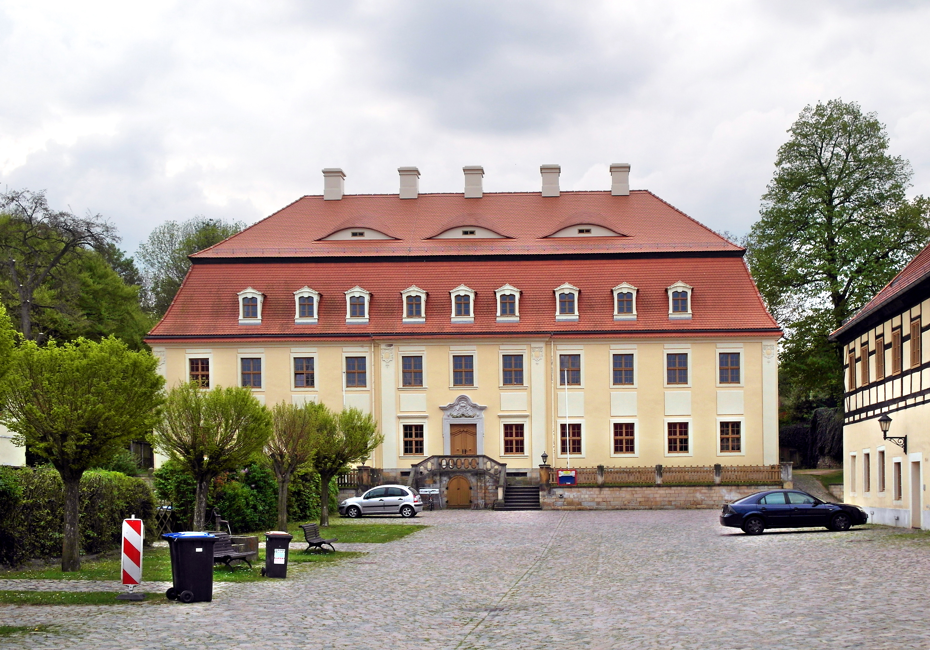 12.05.2017 01594 Staucha (Stauchitz), Thomas-üntzer-Platz (GMP: 51.222656,13.224693): Das Rittergut ist aus einem mittelalterlichen Benediktinerrinnenkloster entstanden, auf dessen Gelände sich Julius Alexander von Hartitzsch 1753-56 sein barockes Landschloß errichten ließ. In der DDR waren hier Wohnungen, eine Kindertagesstätte und die Speisenversorgung der LPG. Seit 1994 hat die Gemeindeverwaltung Stauchitz im 1996-2002 restaurierten Herrenhaus ihren Sitz. Hofseite. [SAM9785.JPG]20170512320DR.JPG(c)Blobelt